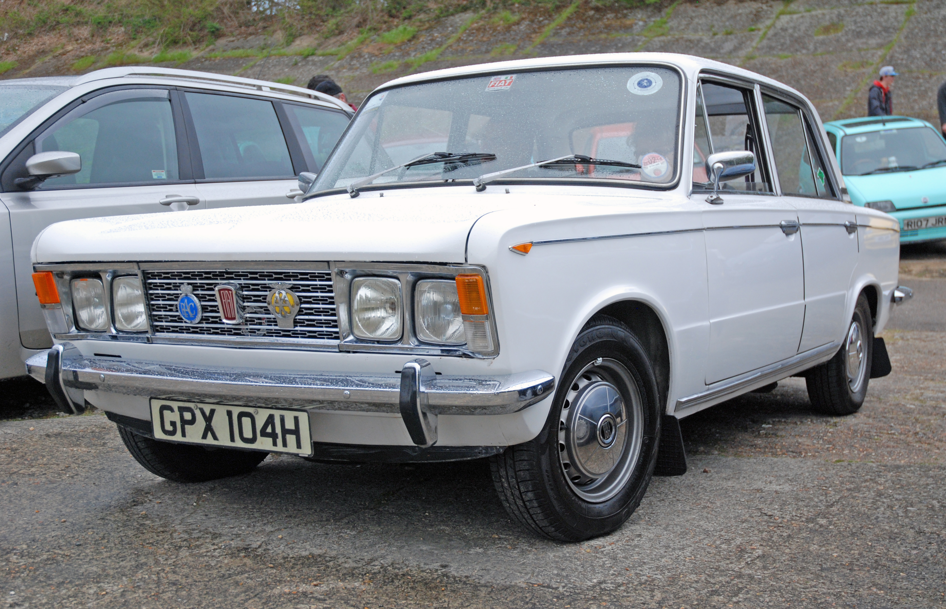 Auto Italia,Brooklands,May 2013